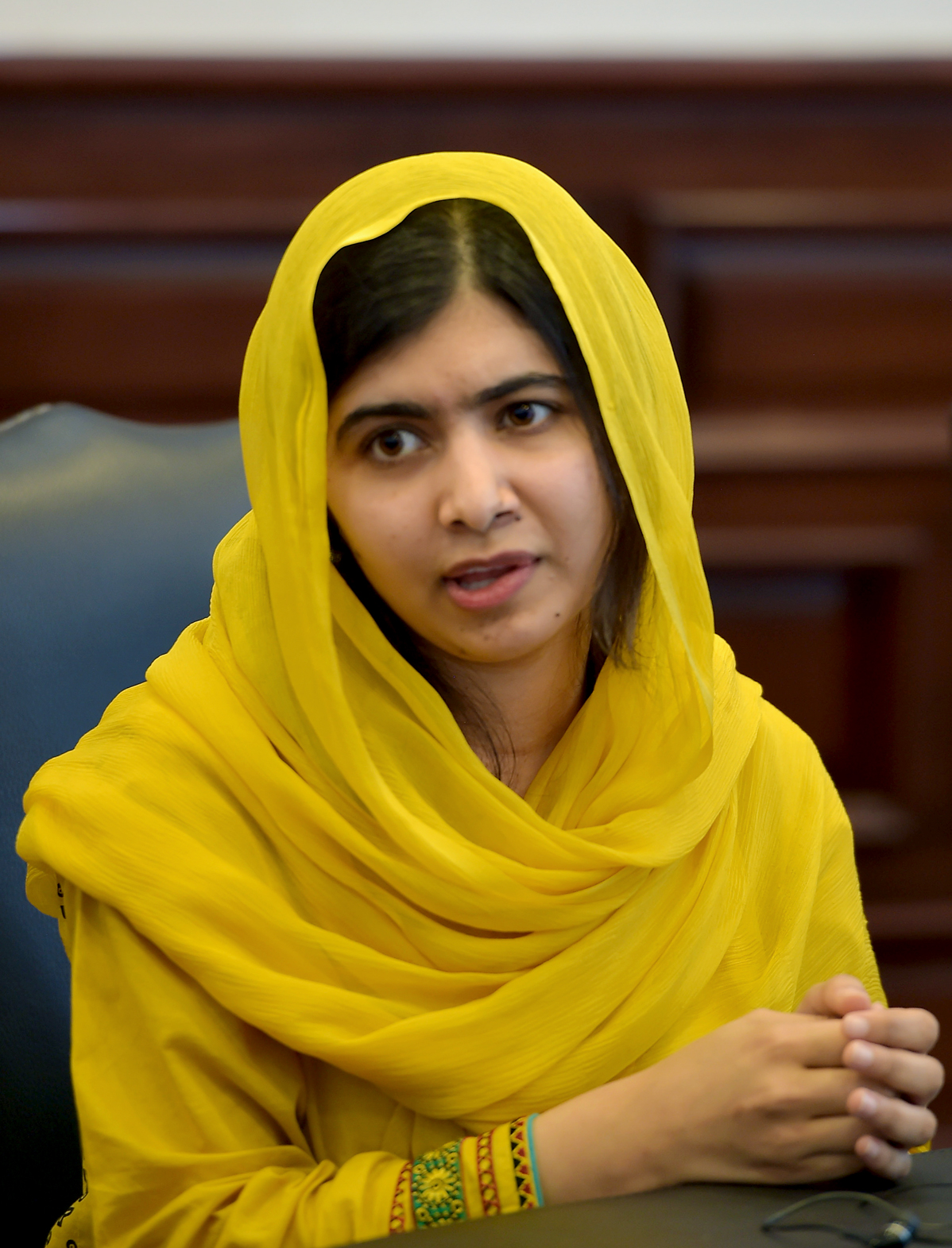 Malala Yousafzai and 57th President of Mexico Enrique Peña Nieto.